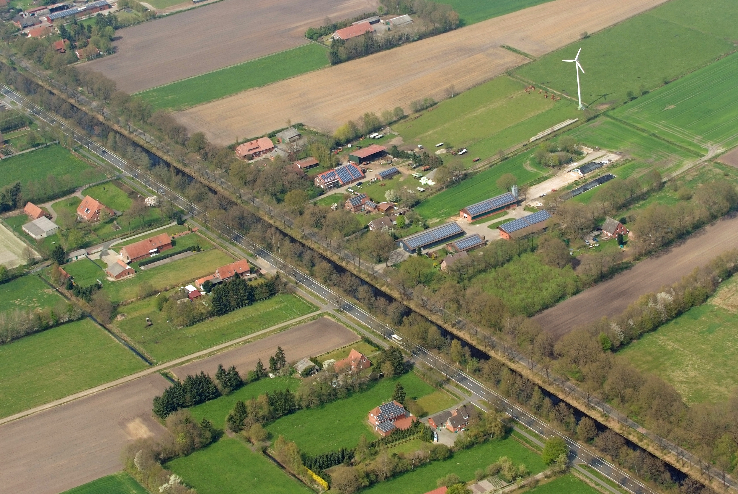 Kampferfehn am Elisabethfehnkanal Fotoflug von Nordholz-Spieka nach Oldenburg und Papenburg